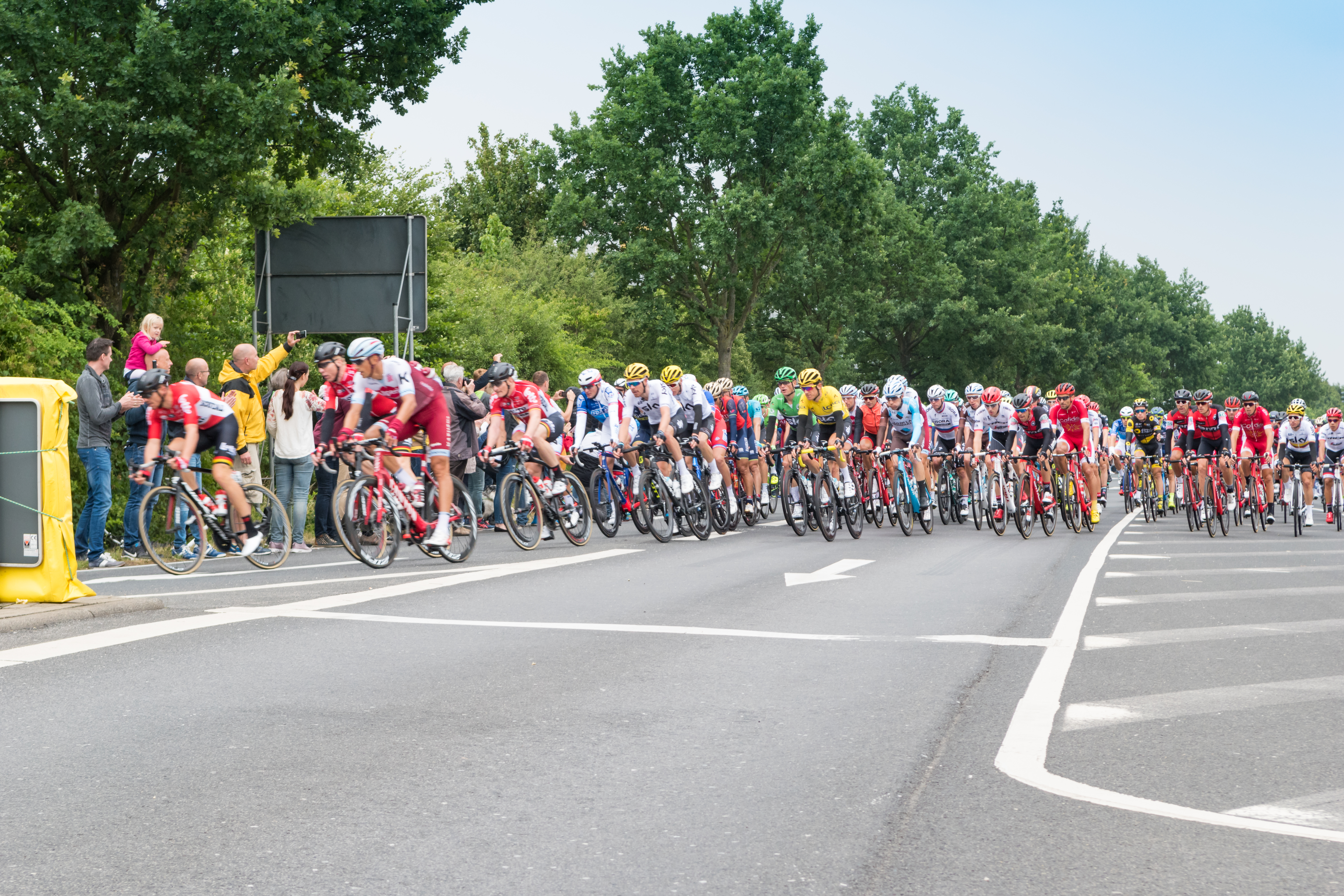 Tour de France 2017, Hauptfeld, Büttgen